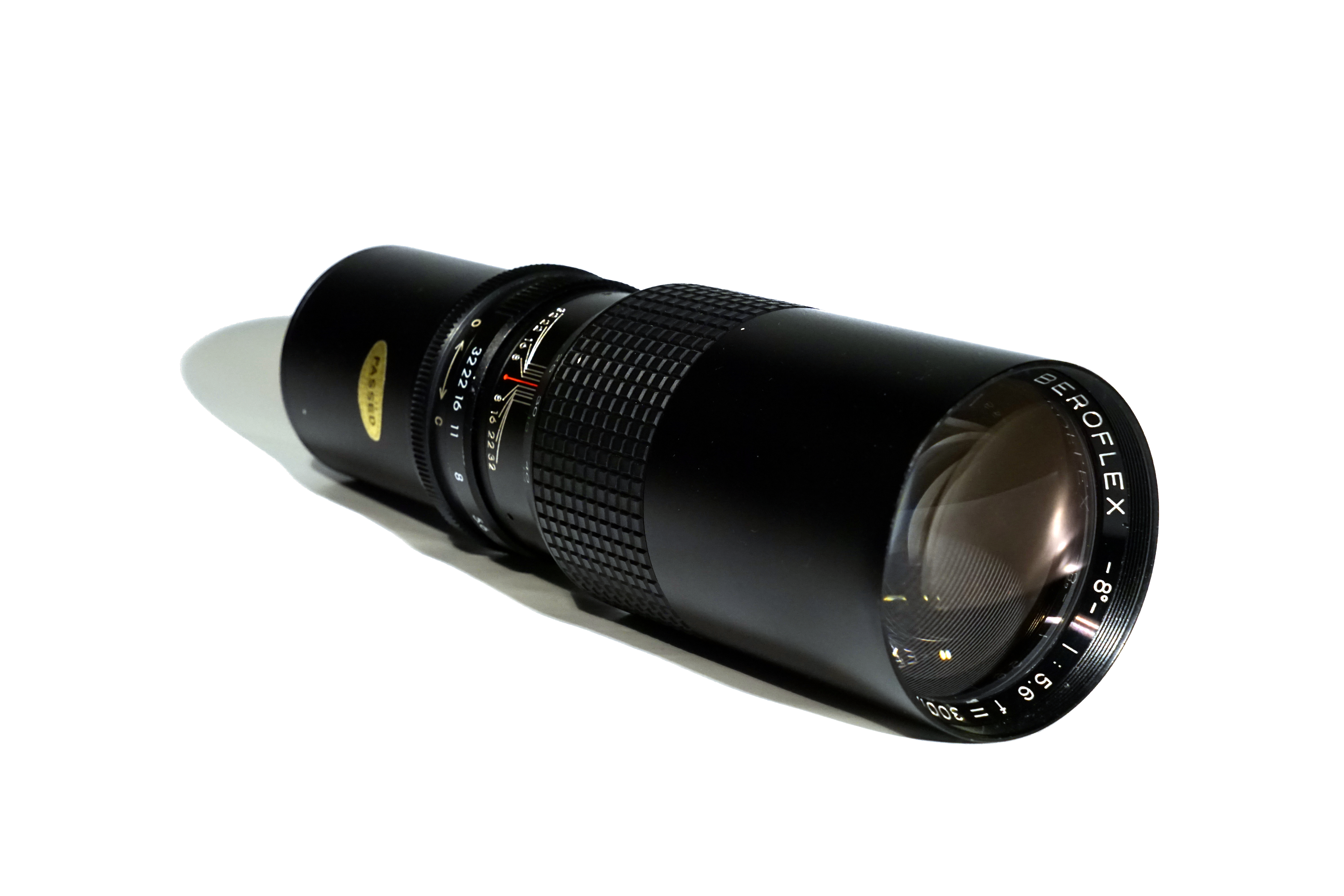 Objektiv Beroflex 300 mm 1:5.6 für M42-Anschluß